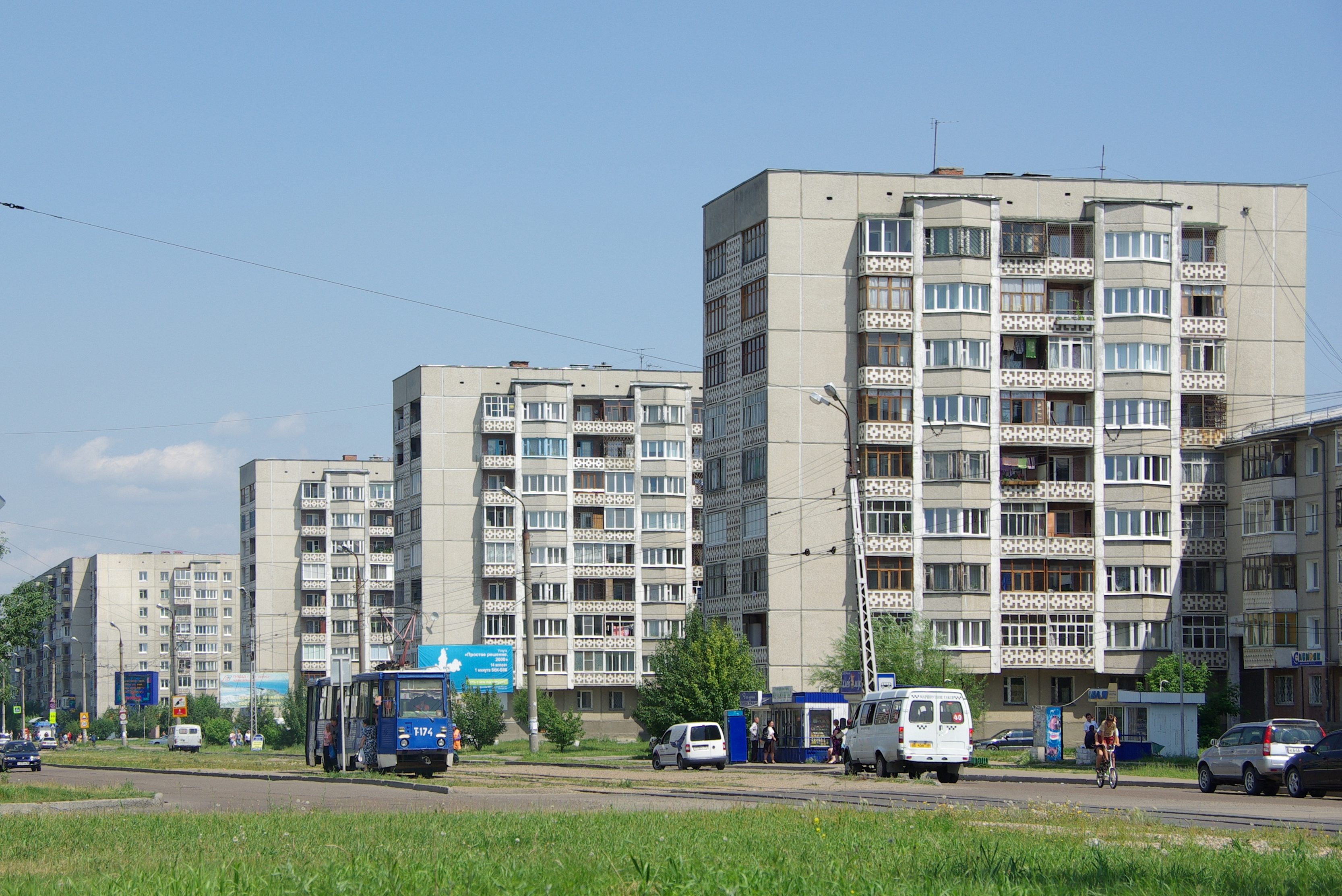 Ангарский трамвай 71-605 174